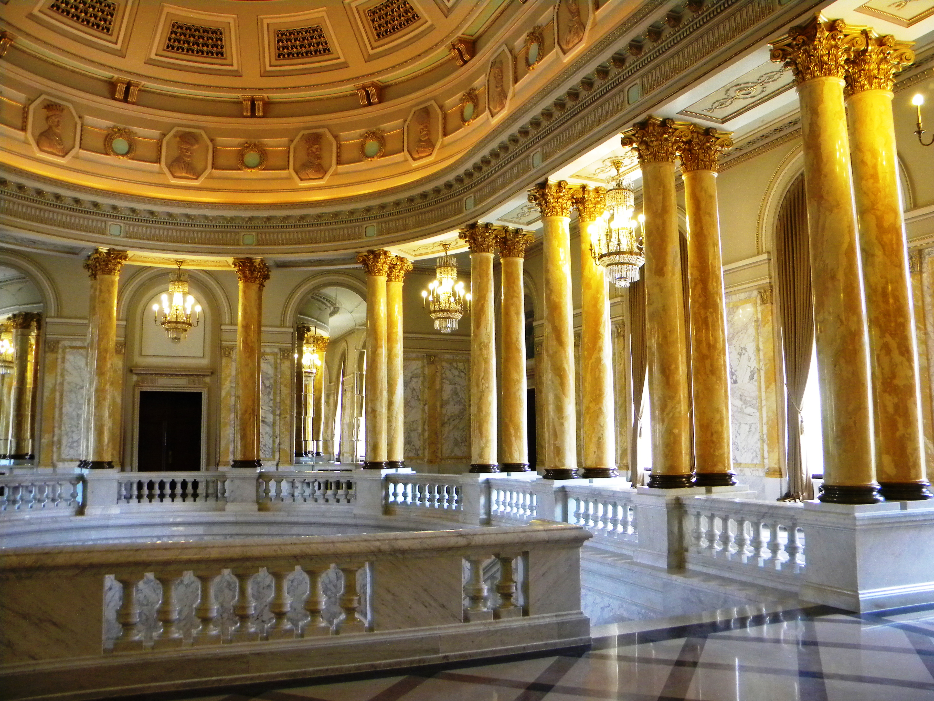 Bucuresti, Romania, Palatul Regal (Muzeul National de Arta al Romaniei - Pavilionul Sala Tronului - interior 21 ); B-II-m-A-19856